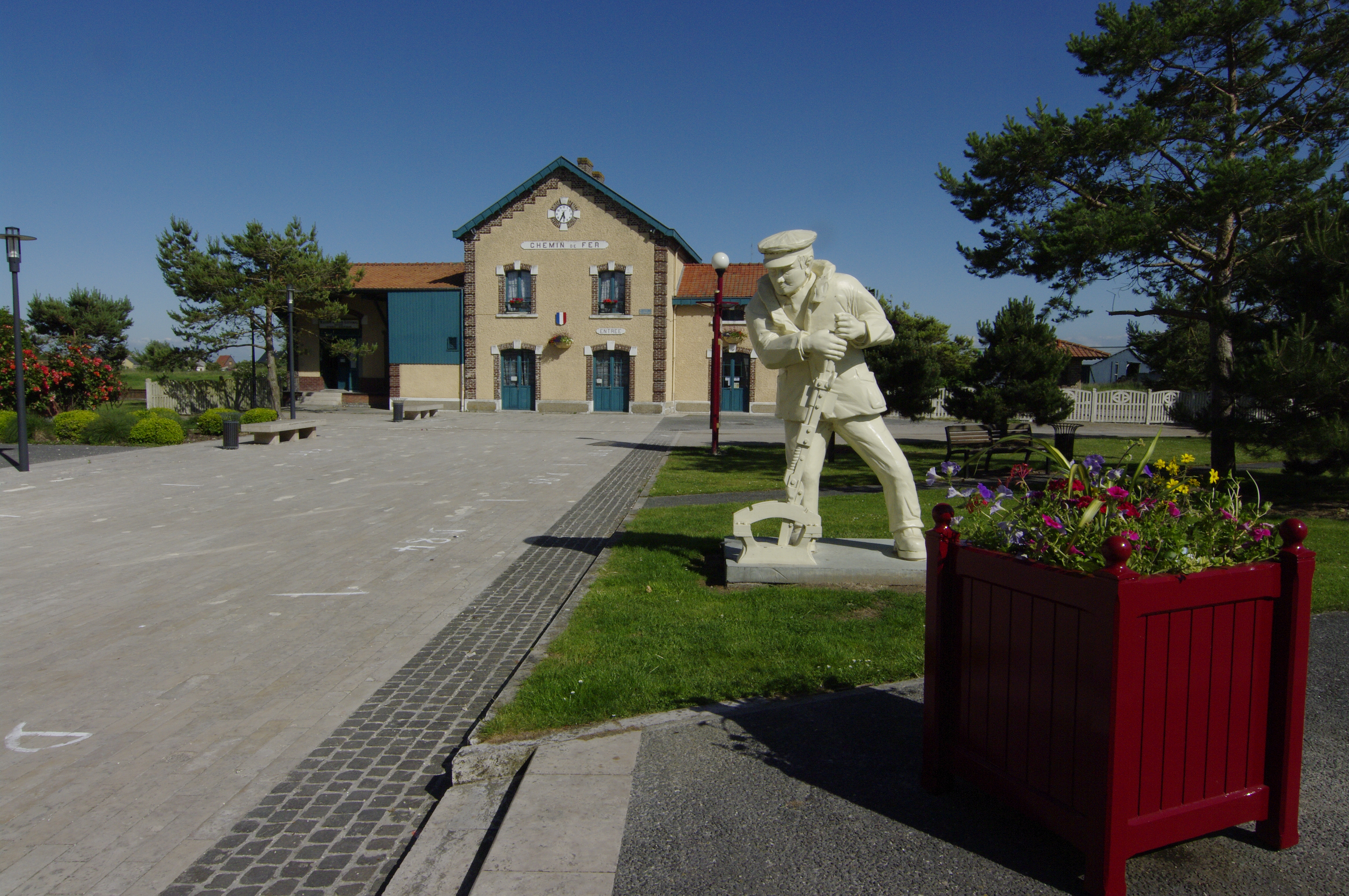 La gare de Cayeux-sur-mer, Somme.